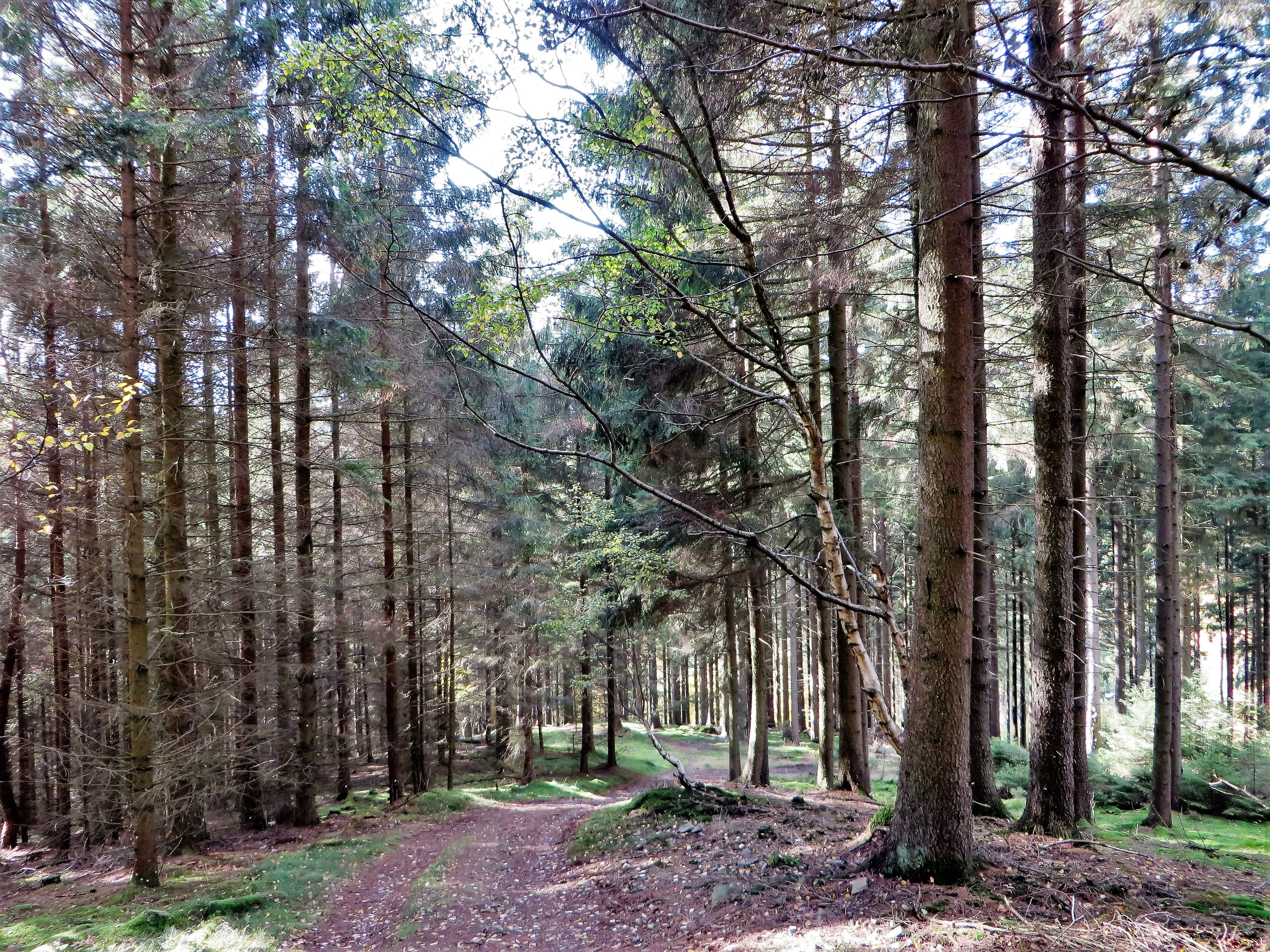 Landschaftsschutzgebiet „Muhlerohl“ in Hagen-Rummenohl. Der abgebildete Bereich befindet sich auf 280 m Höhe, oberhalb Rölveder Straße und Evringhauser Straße. Das gesamte Schutzgebiet liegt südlich von „Sterbecker Hammer“. Es handelt sich überwiegend um bewaldete Flächen.